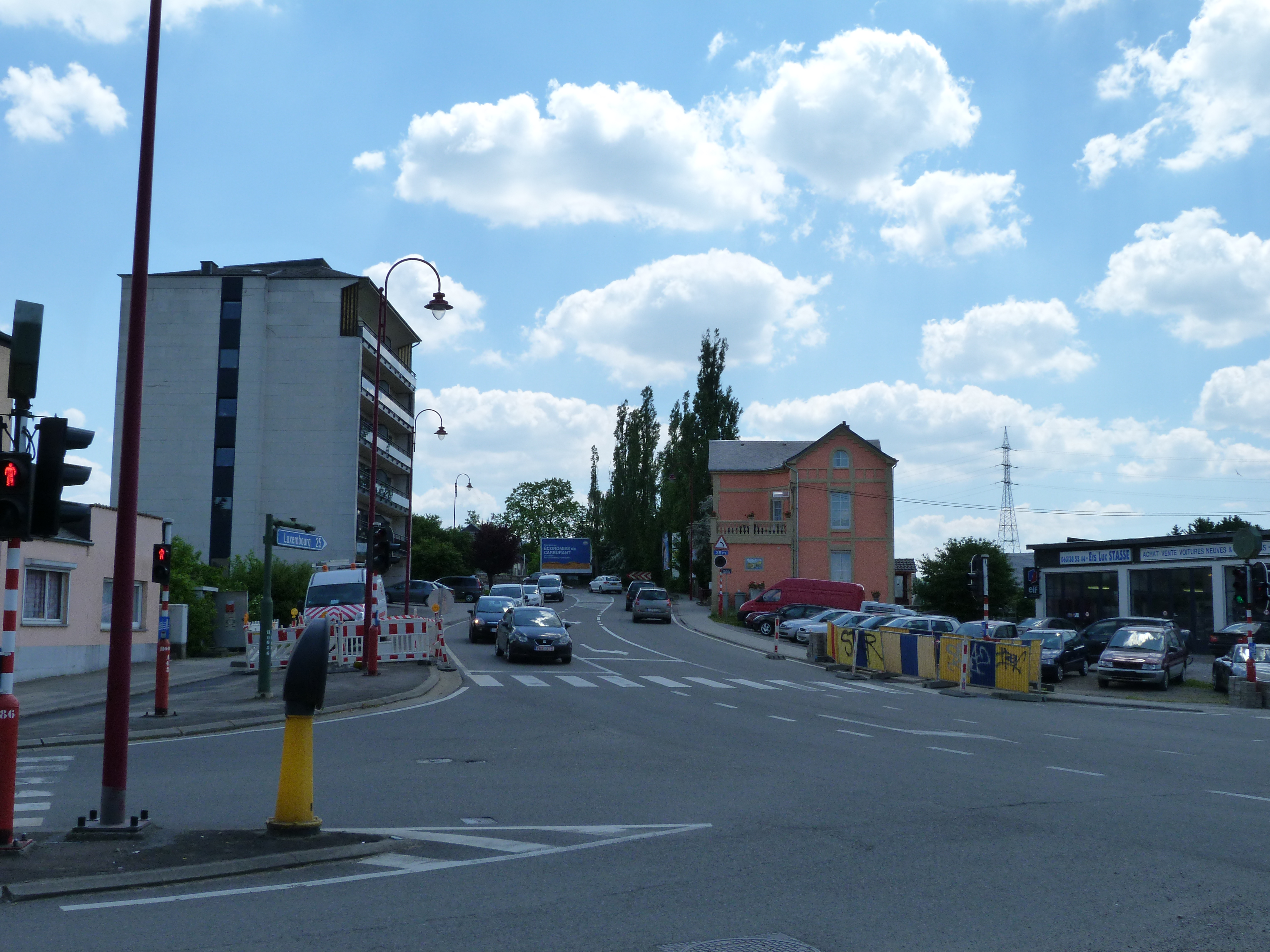 L'entrée dans Athus depuis Aubange, et le pont du chemin de fer (Avenue de la Libération) en juin 2013.